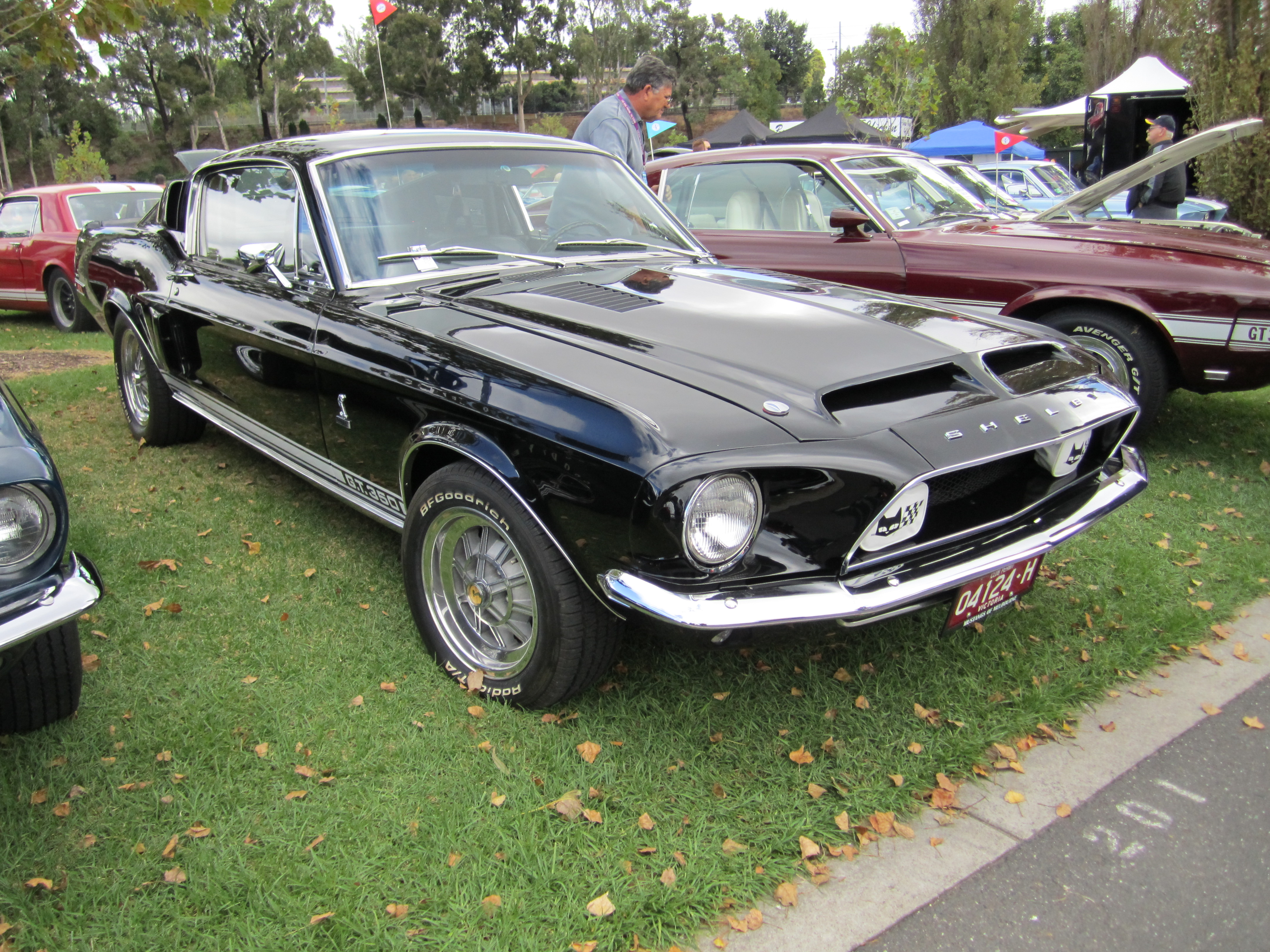 Raven Black.